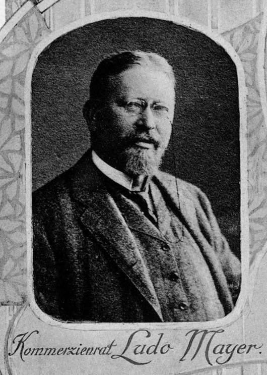 Inhaber der J. Mayer & Sohn